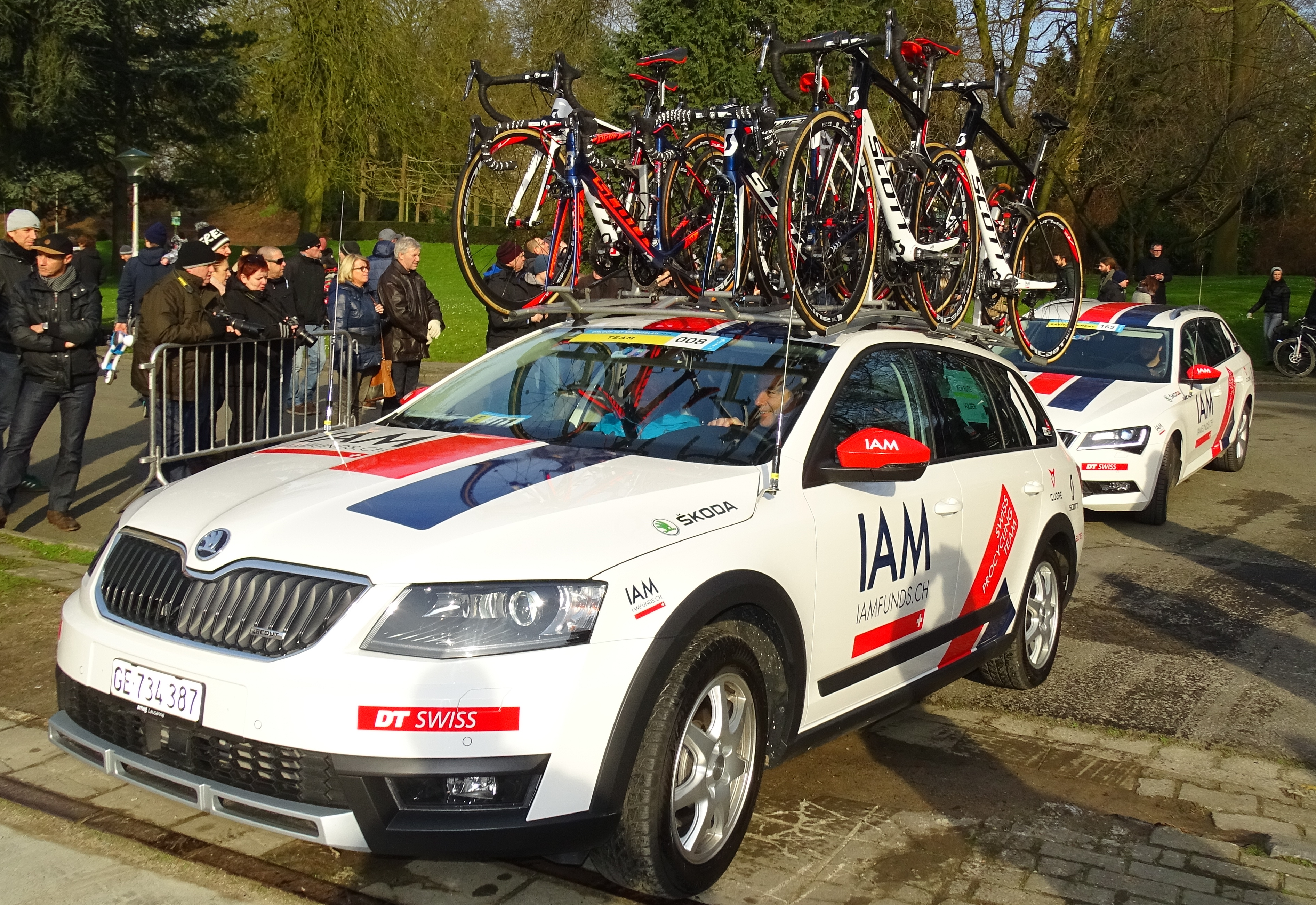 Reportage réalisé le samedi 27 février à l'occasion du départ et de l'arrivée du Circuit Het Nieuwsblad 2016 et de l'arrivée du Circuit Het Nieuwsblad féminin 2016 à Gand, Belgique.